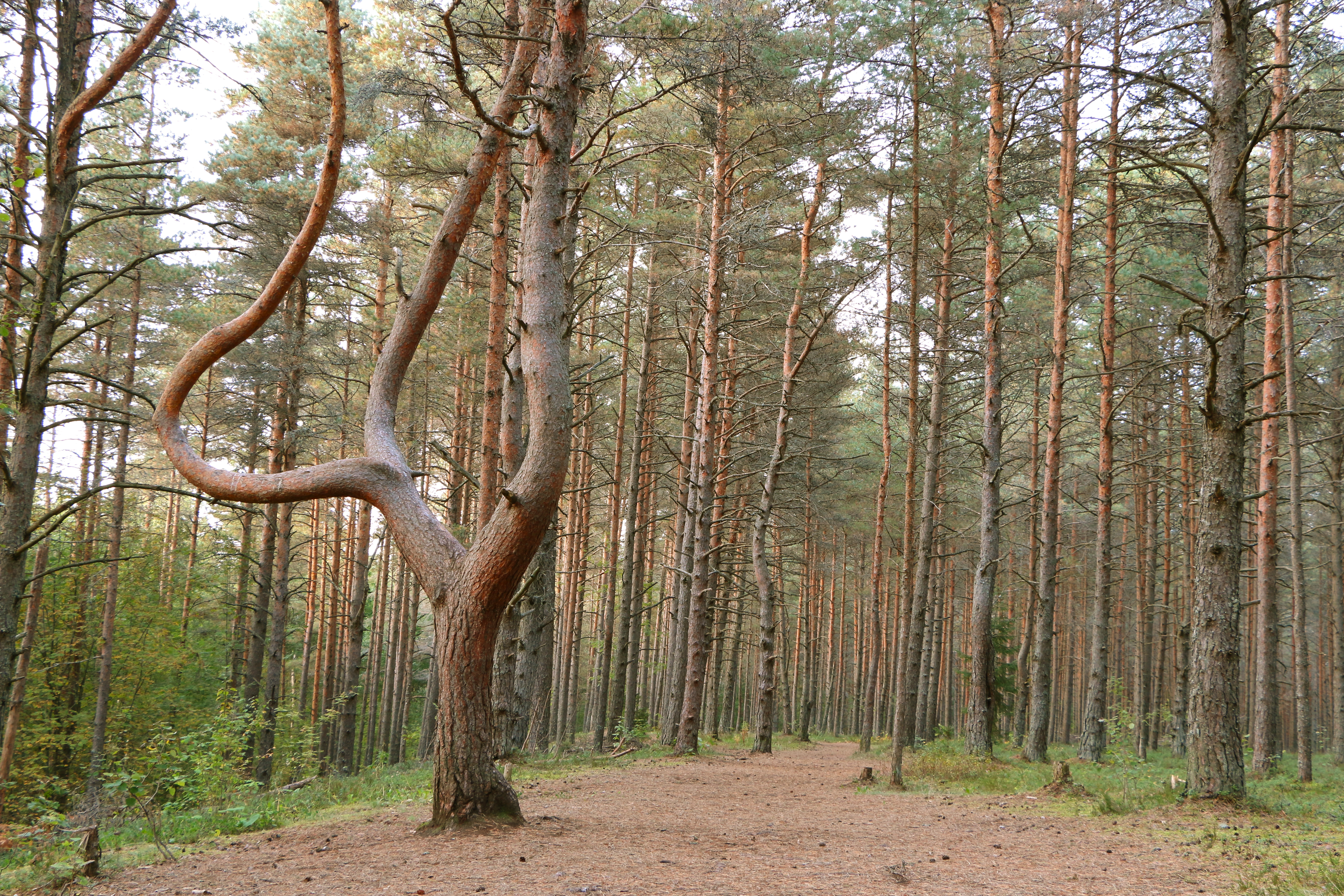 Looklev mänd pääsküla raba matkarajal